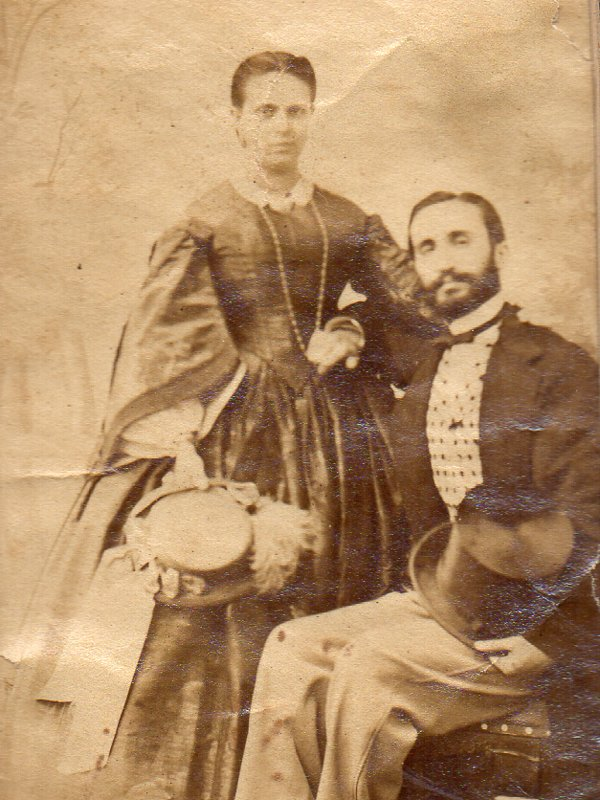 Alceste De Lollis con la moglie Filomena Colalongo, (genitori anche di di Cesare De Lollis) foto di famiglia fornita da Donatella Artese, figlia di Alessandro e di Jolanda De Lollis, figlia di Concetta Zecca e di Cirillo uno dei figli della coppia ritratta.